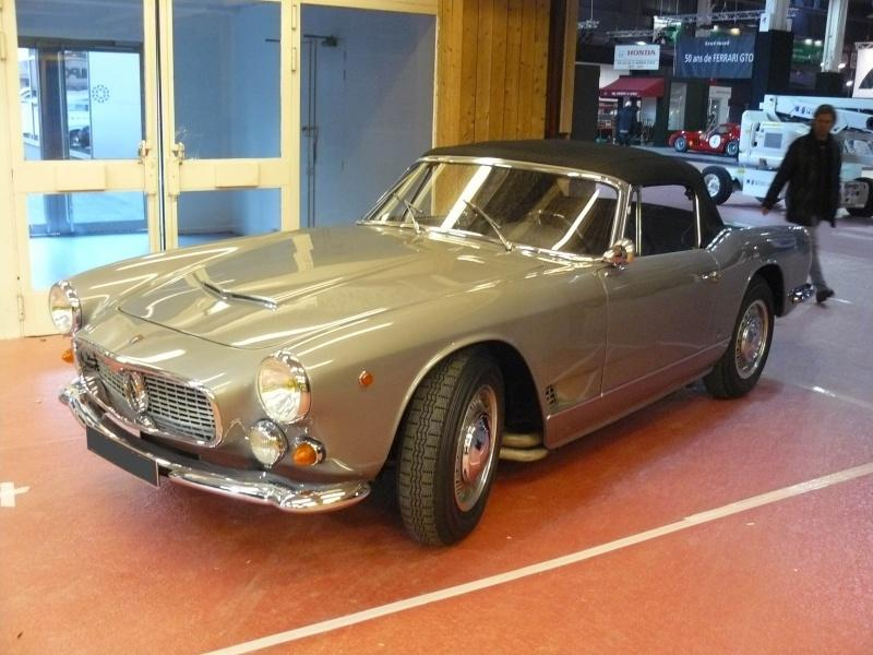 Retromobile 2012